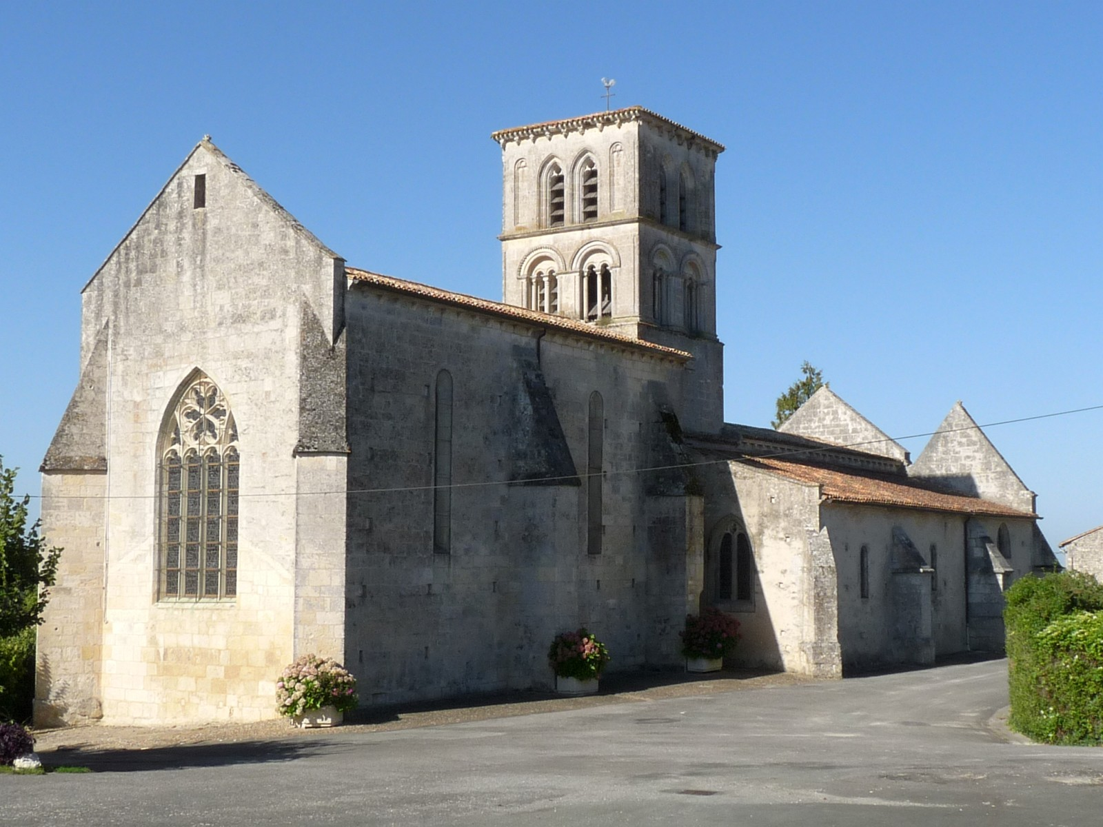 Eglise d'Arthenac, Charente-Maritime, France